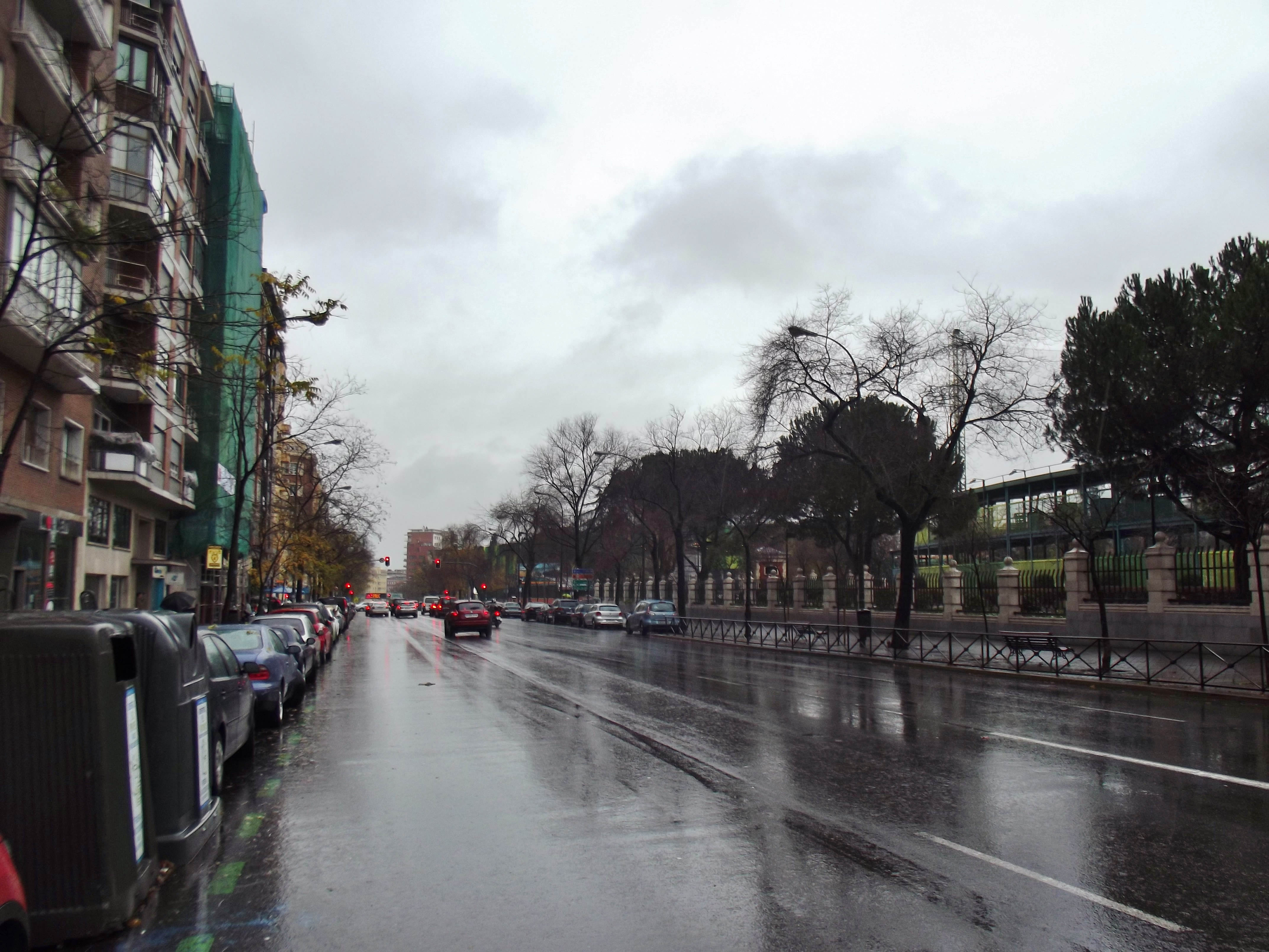 Avenida de Filipinas, Madrid